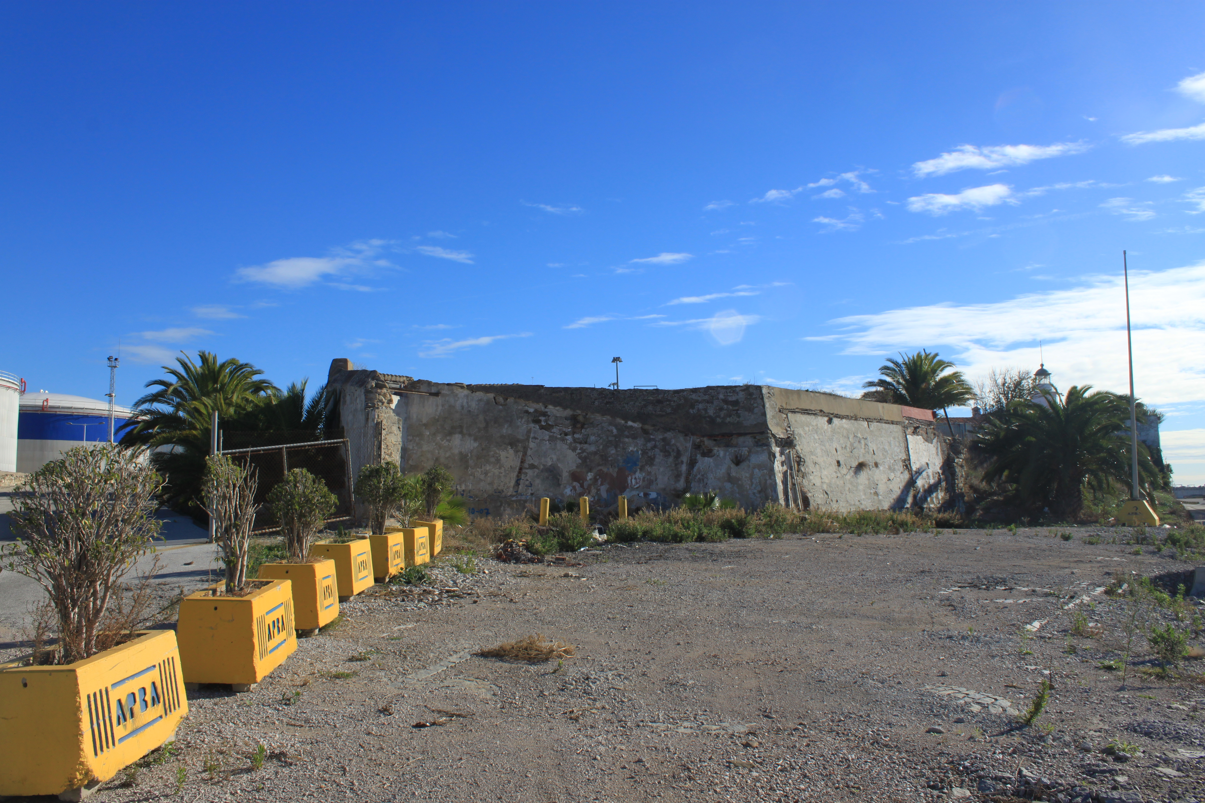 Restos del Fuerte de Isla Verde, en el interior de las instalaciones del Puerto de Algeciras. Algeciras, Andalucía, España.